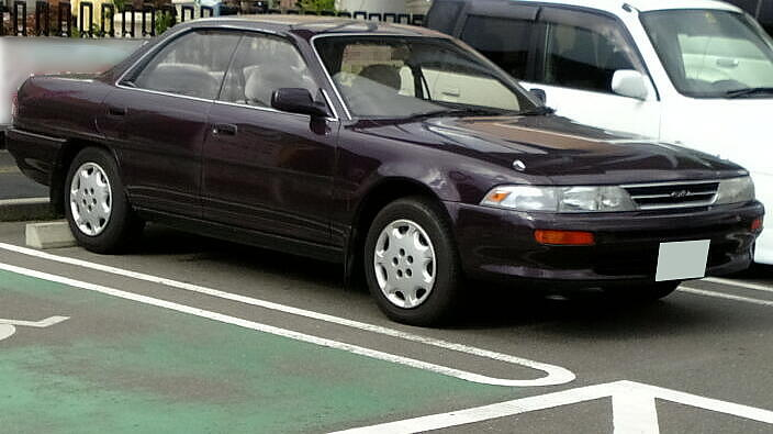 トヨタ・コロナEXiV（初代, ST180）